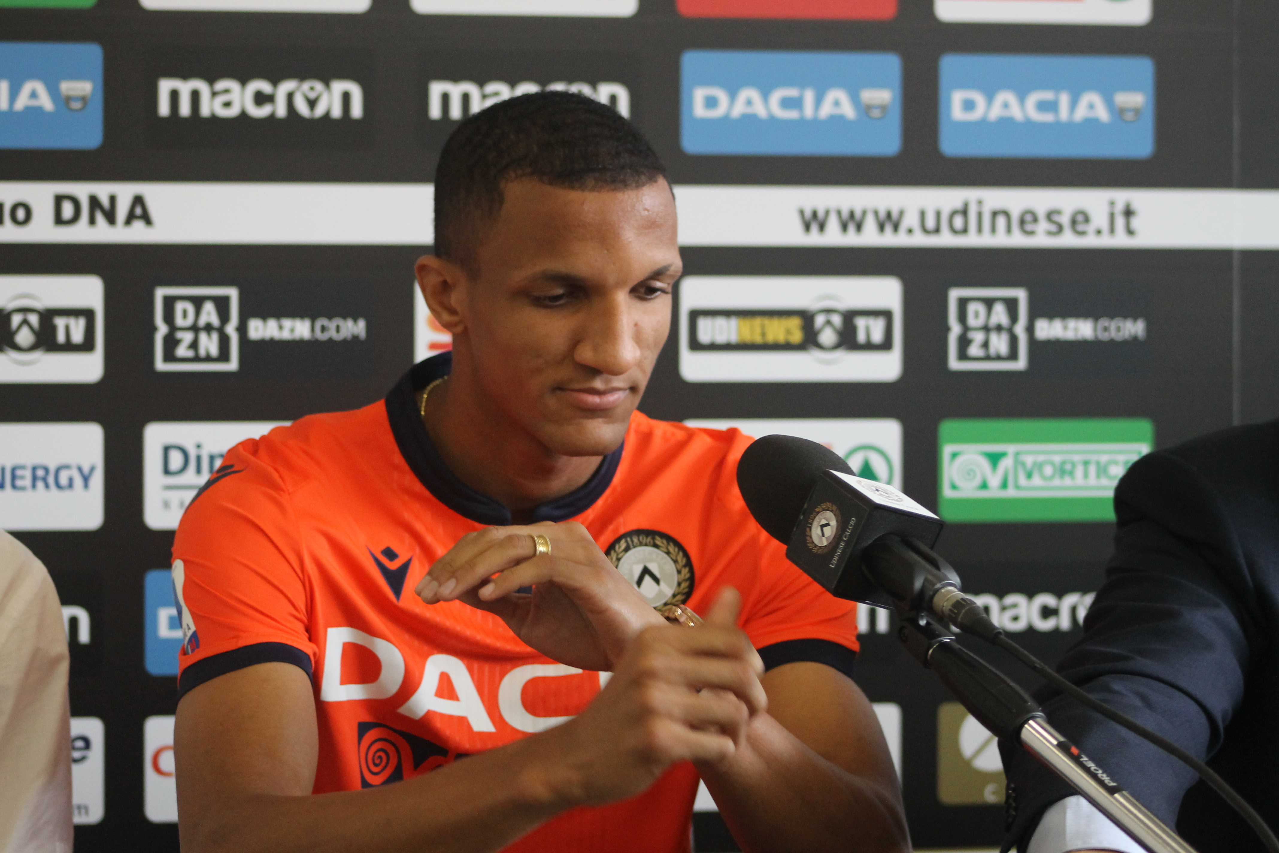 Rodrigo Becão il giorno della presentazione all'Udinese.